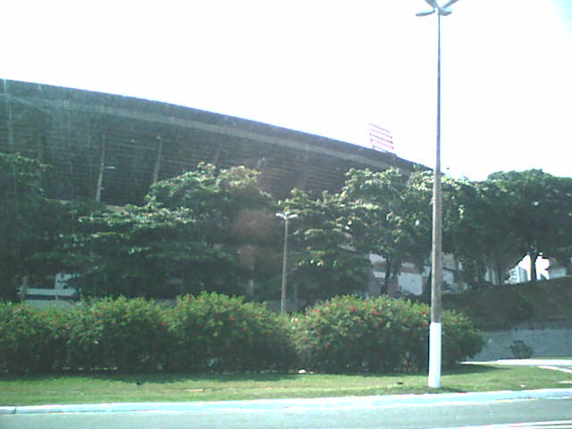 Foto do Estádio Fonte Nova, Salvador, Bahia, Brasil.